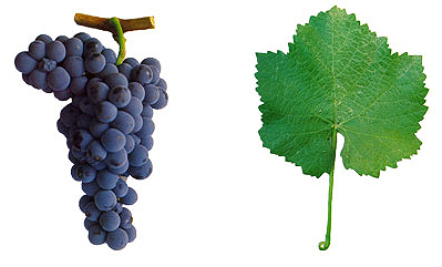 Traube und Blatt der Rotweinsorte 'Alfrocheiro'